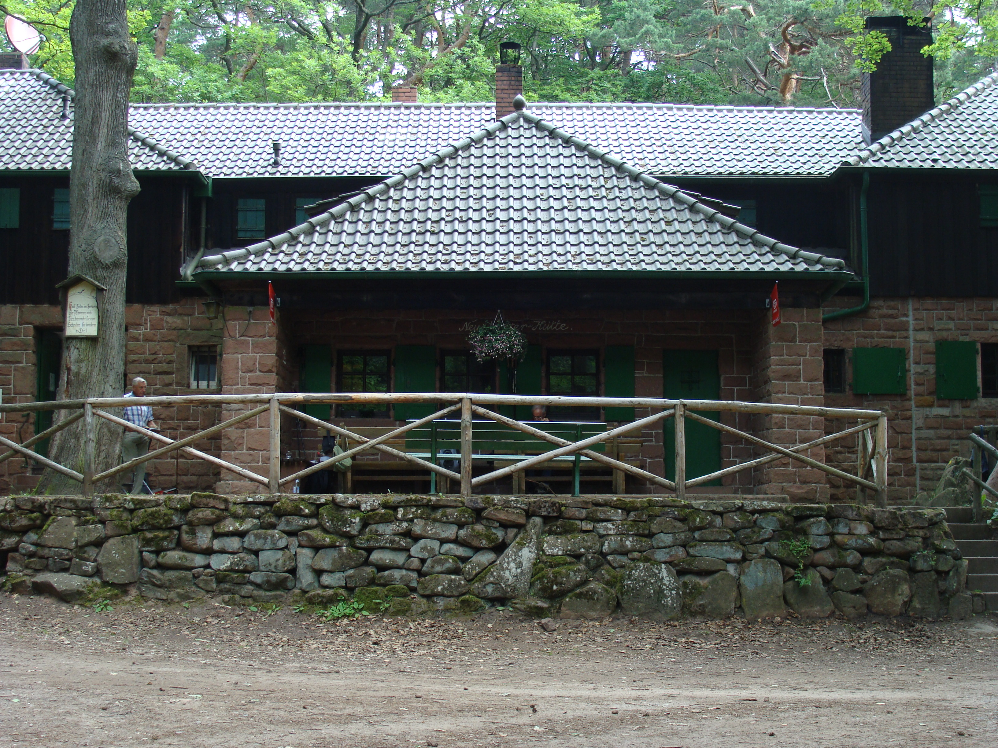 Hellerplatzhaus bei Neustadt an der Weinstrasse (Pfälzerwald) - Haupthaus